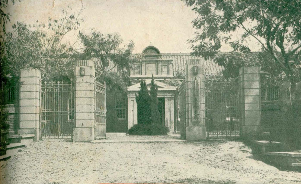 專賣局台南支局於1906年建成的廳舍，其入口裝飾與現況不同